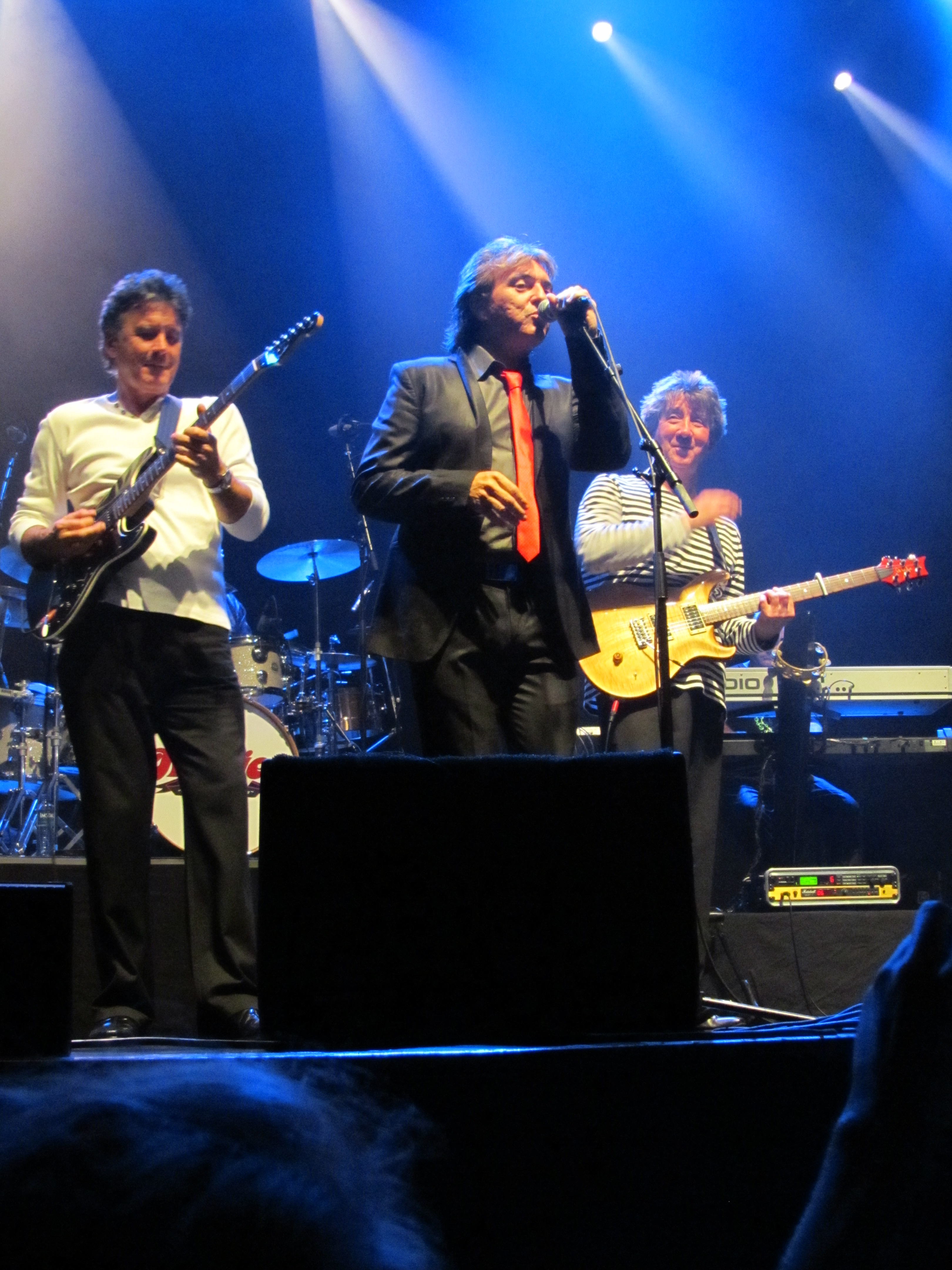 Hollies på Sentrum Scene. Fra venstreː Steve Lauri, Peter Howarth, Tony Hicks.